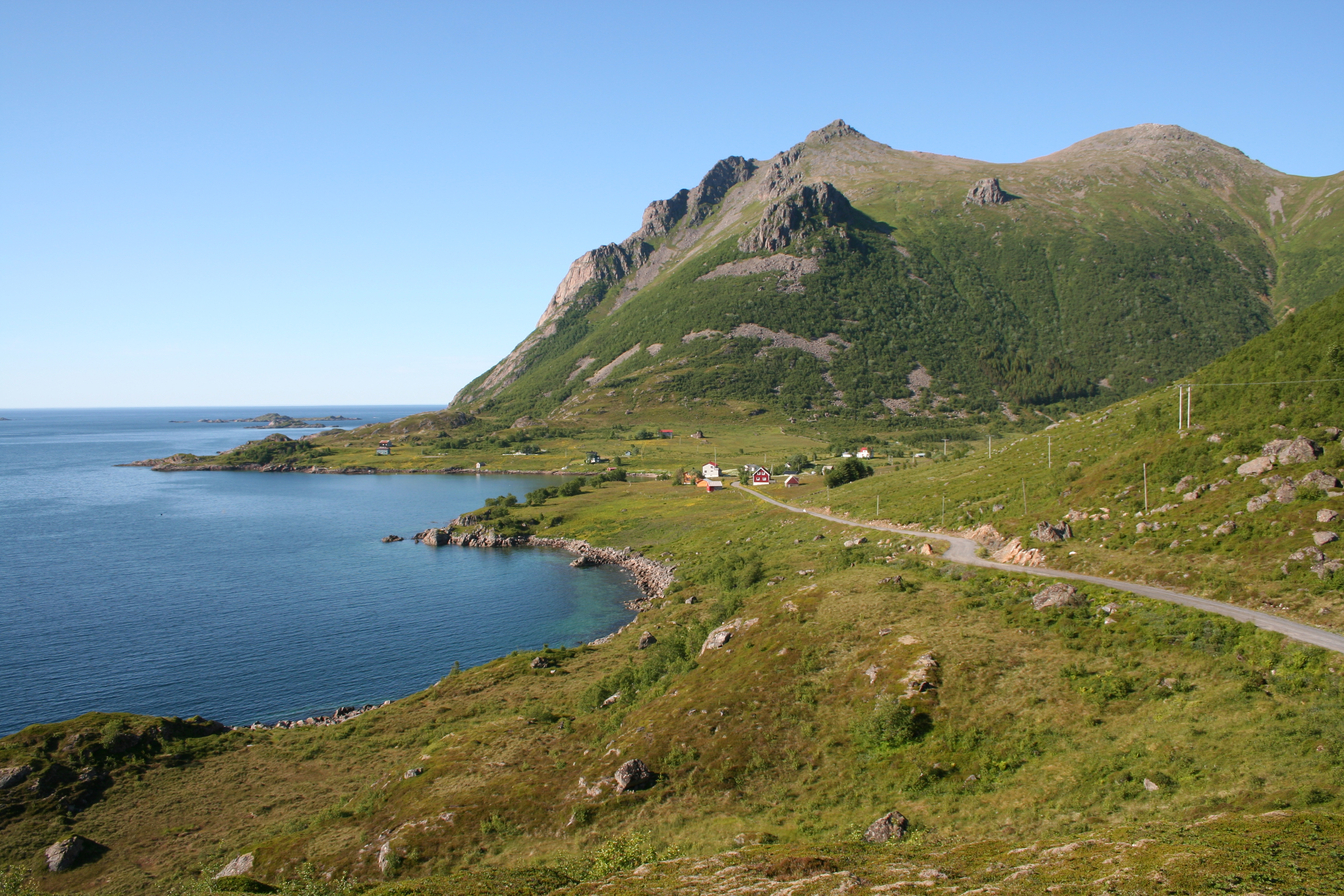 Utskor in Bø, Nordland, Norway